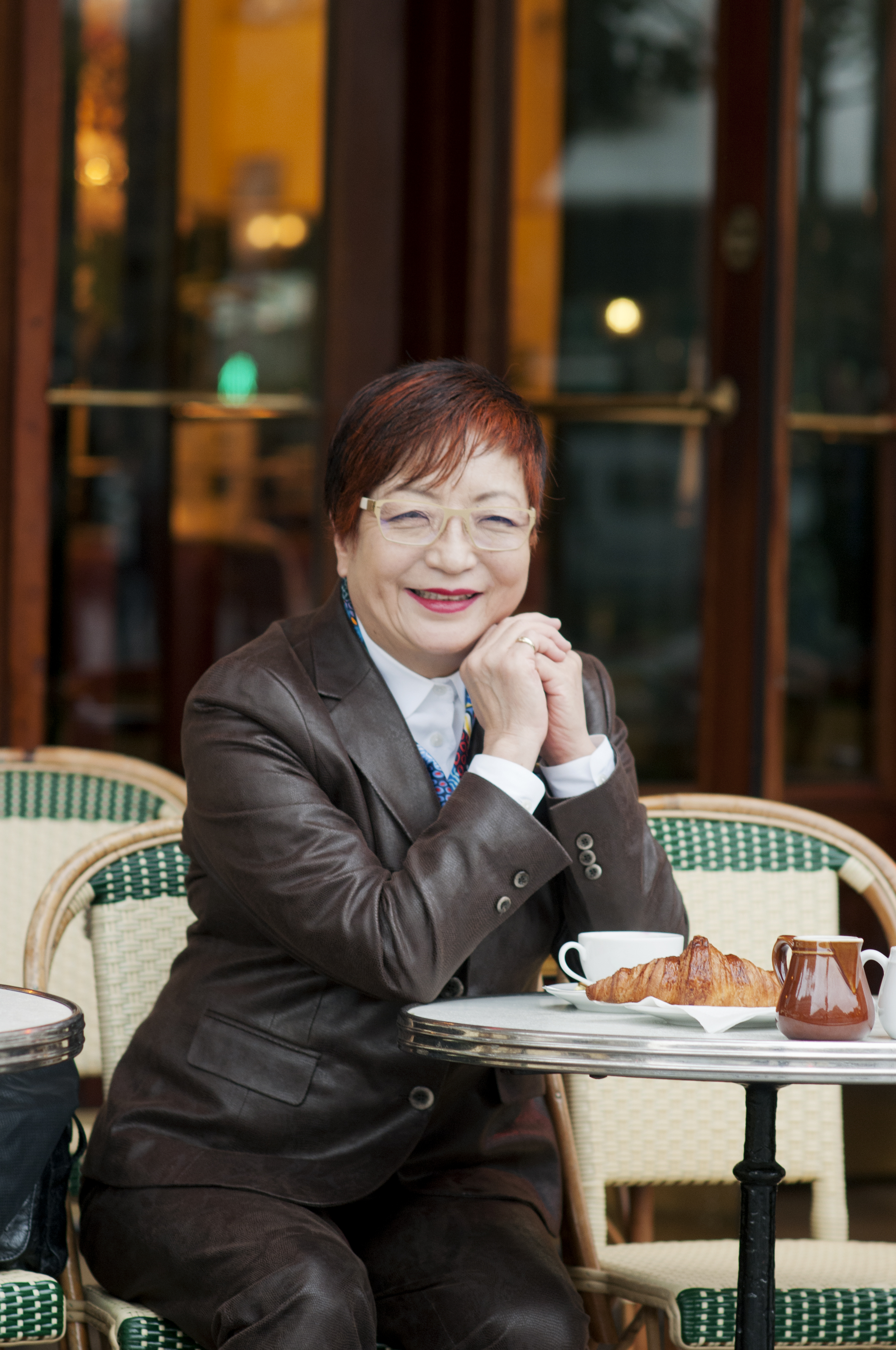 久保村喜代子 近影